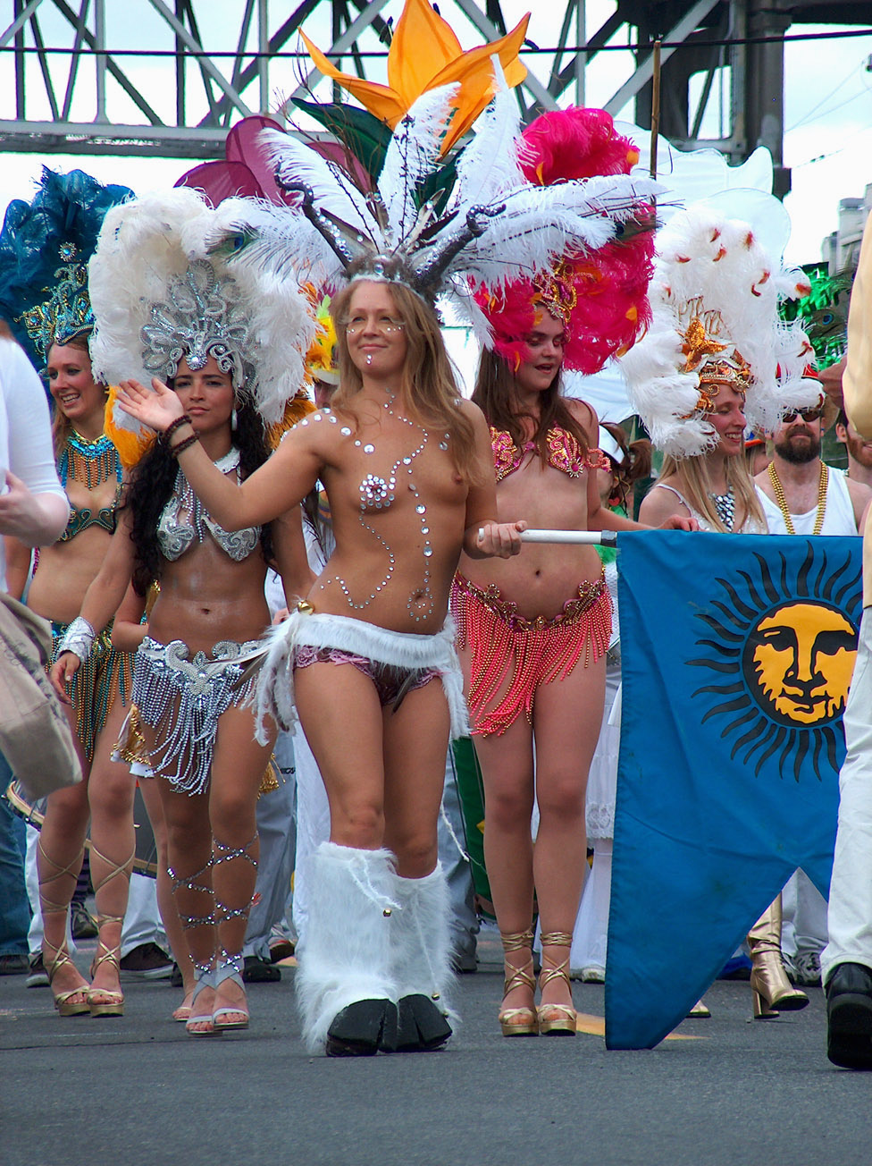 BannerCarrierLeft